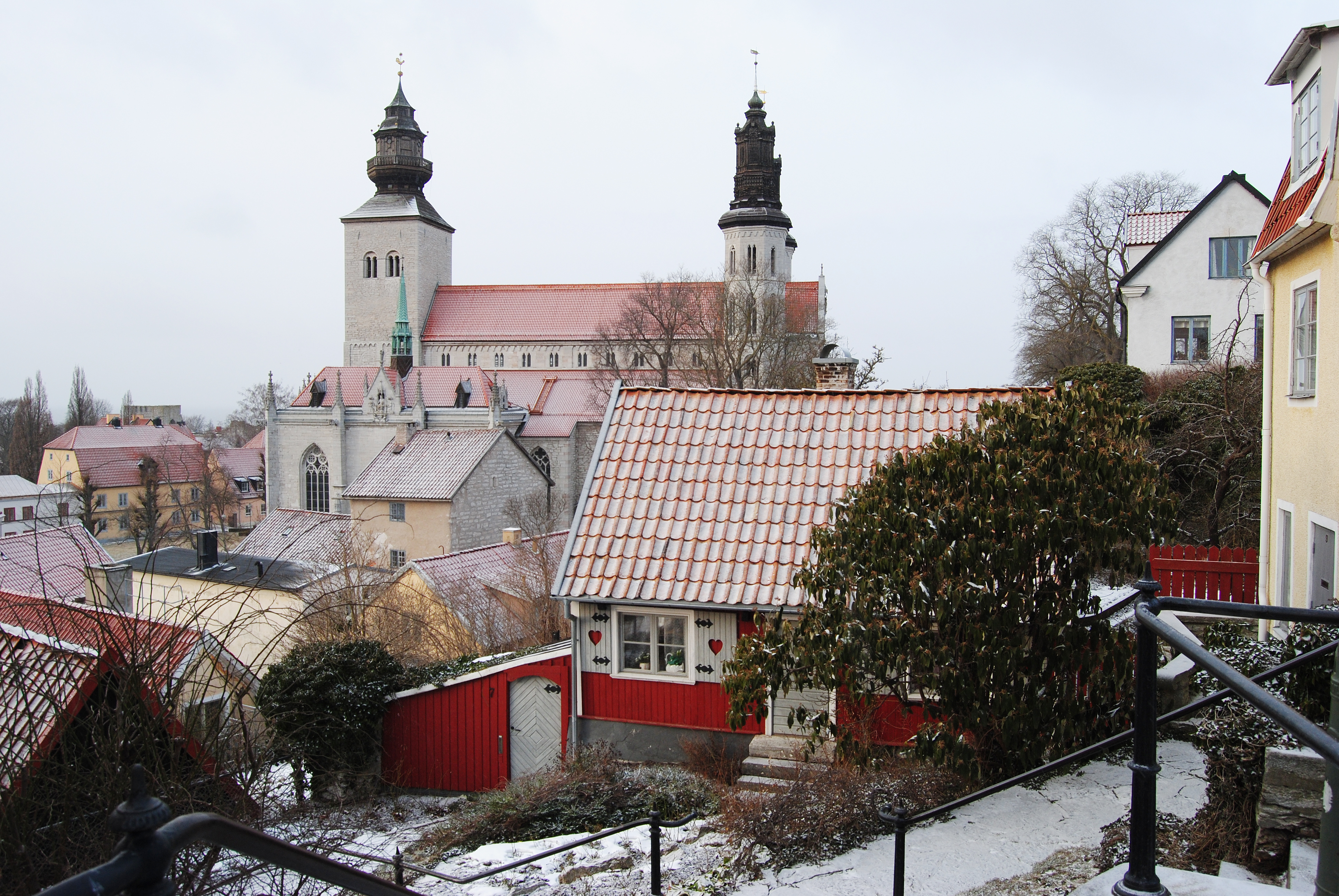 Fastighet S:ta Maria 29, Övre Finngränd 7, i bakgrunden syns S:ta Maria Domkyrka i Visby, Gotland. Idnr i Bebyggelseregistret 21300000020478